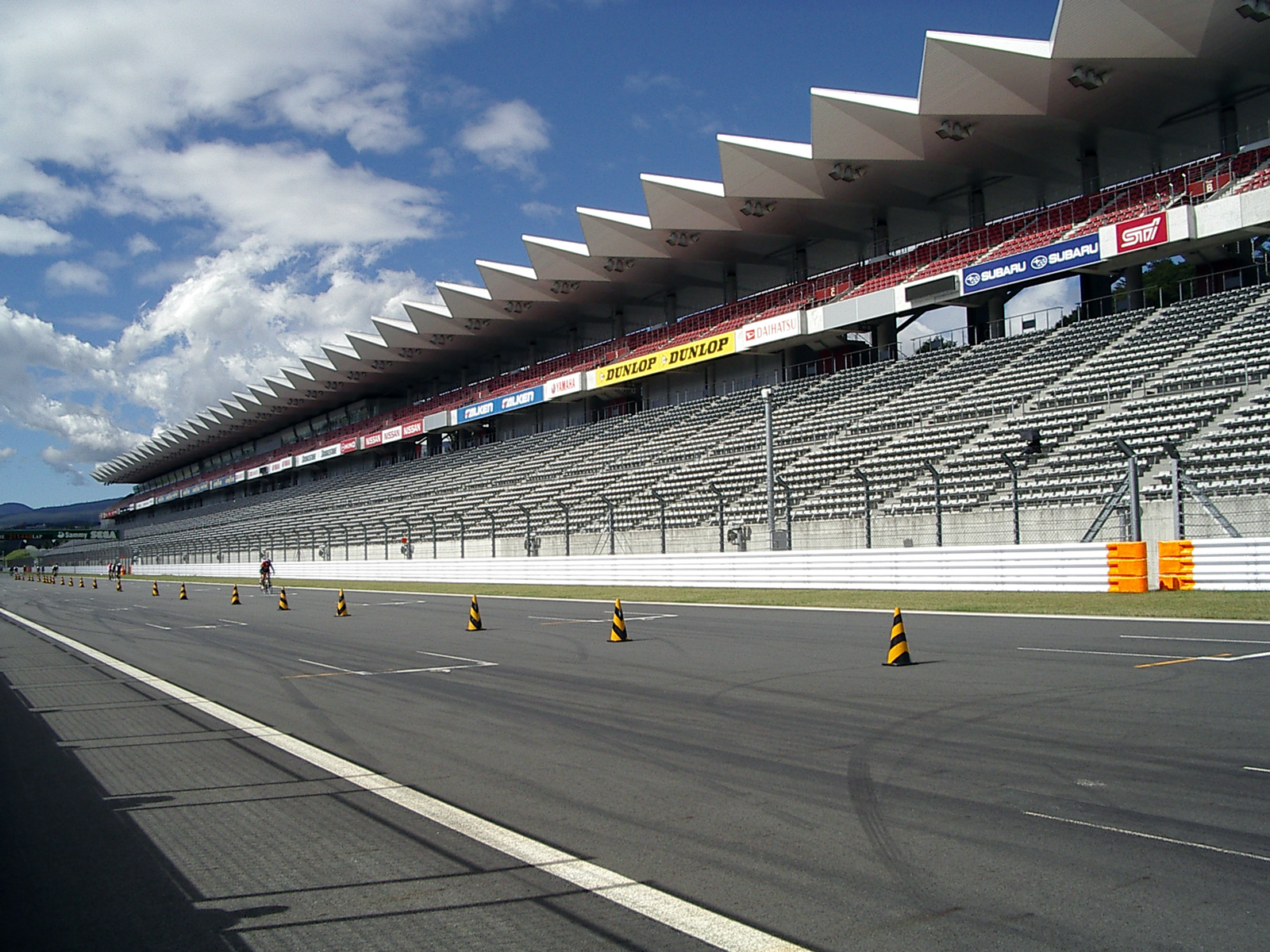 Fuji Speedway Mainstand The picture was taken by myself at "2006 cycling festival in Oyama" in October 7, 2006 富士スピードウェイのメインスタンド。2006年10月7日に行なわれた「2006 サイクリングフェスティバル イン 小山」で撮影。